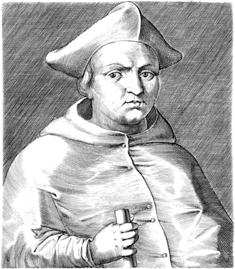 Retrato del cardenal Pompeo Colonna (1479-1532), virrey de Nápoles.